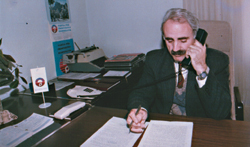 Nevzat Halili ish politikan themelues dhe kryetaribi parë i partisë PPD dhe kryetarë i vetëshpallur i Republikës së Iliridës